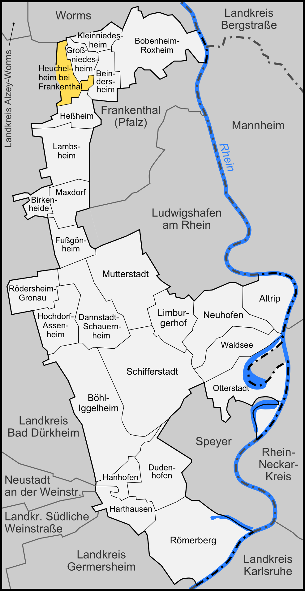 Karte der Gemeinde Heuchelheim bei Frankenthal im Rhein-Pfalz-Kreis